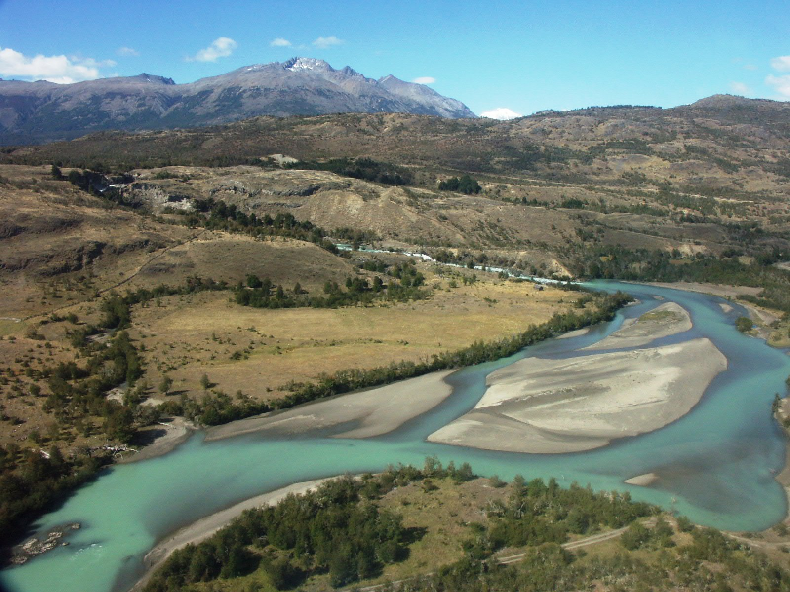 Aysén, Chile